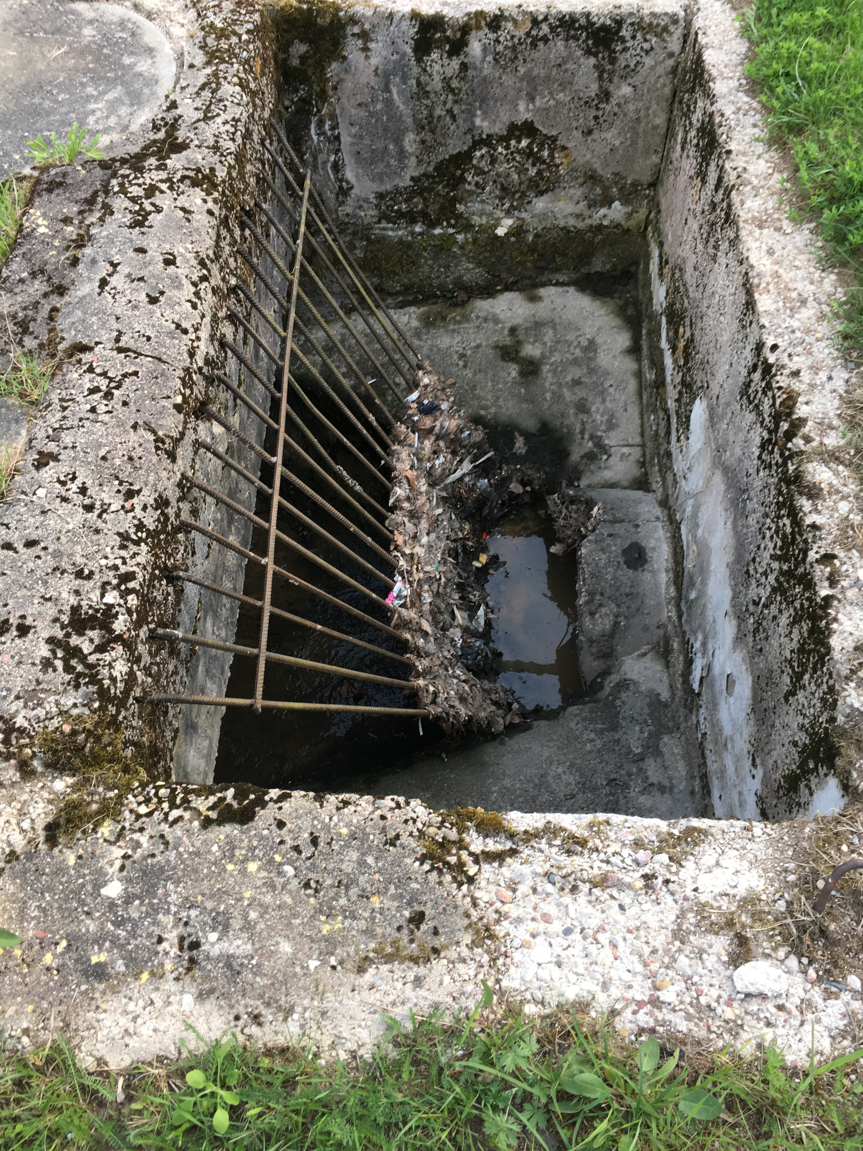 Įtekįjimo grotos nešmenims surinkti